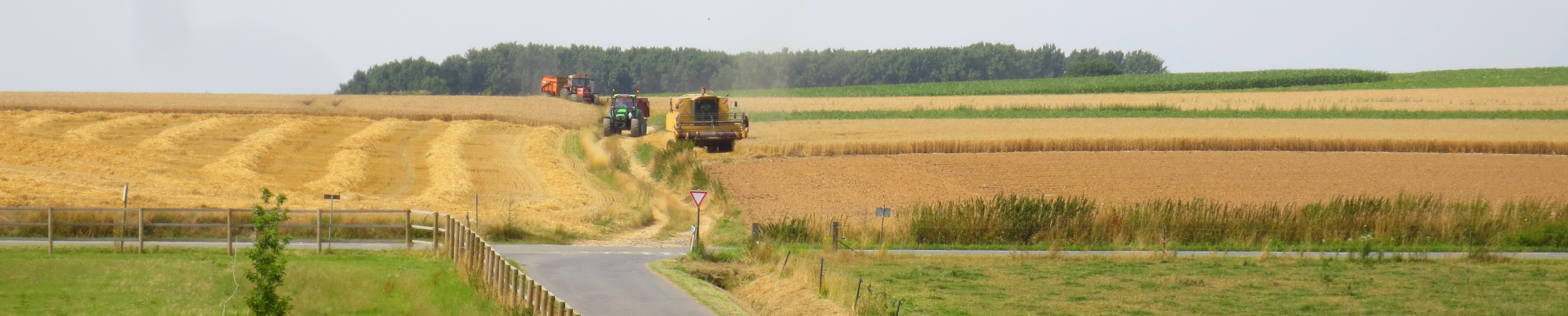 Gondregnies